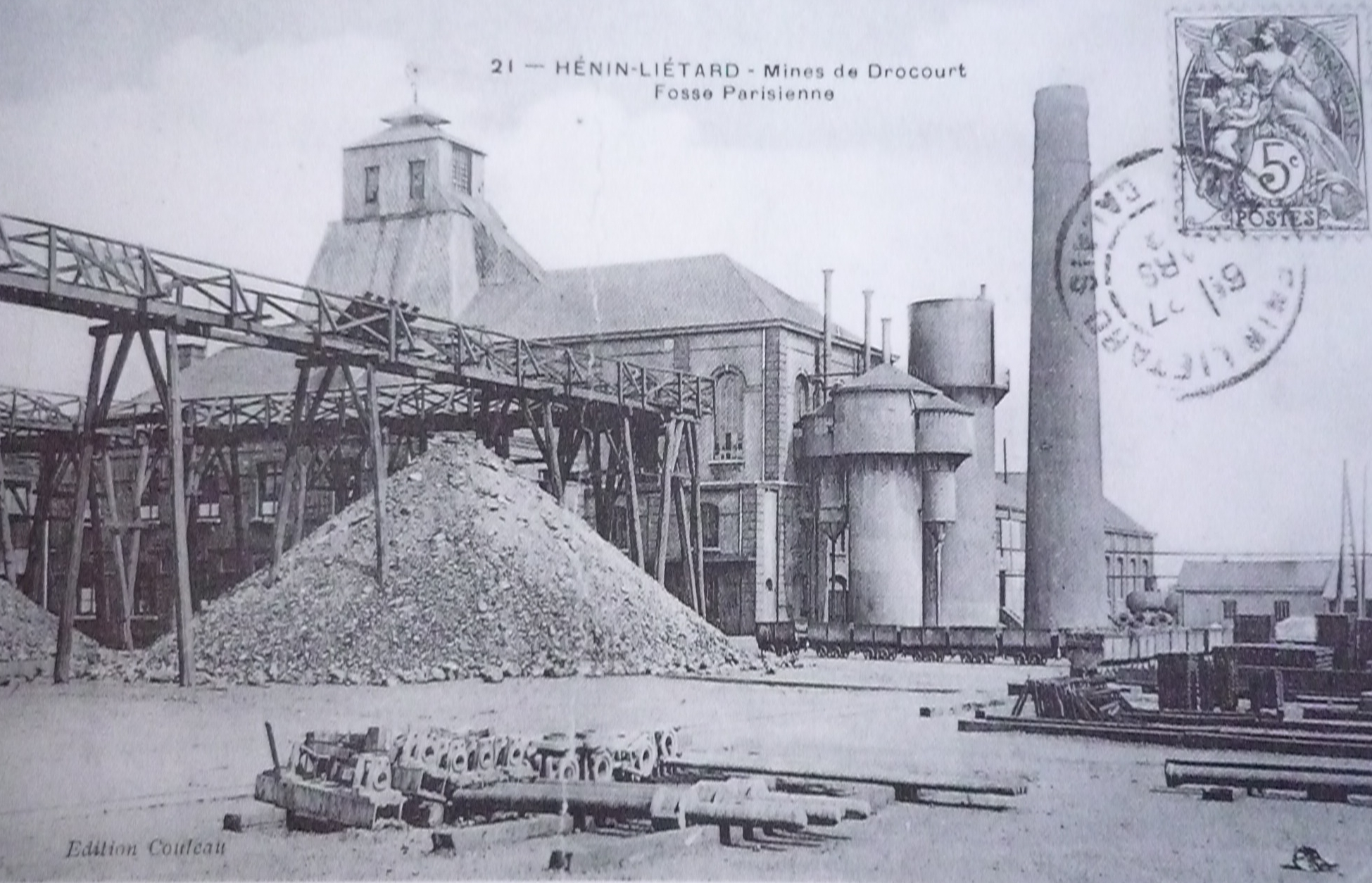 La Fosse n° 1 dite La Parisienne de la Compagnie des mines de Drocourt était un charbonnage constitué d'un seul puits situé à Hénin-Beaumont, Pas-de-Calais, Nord-Pas-de-Calais, France.